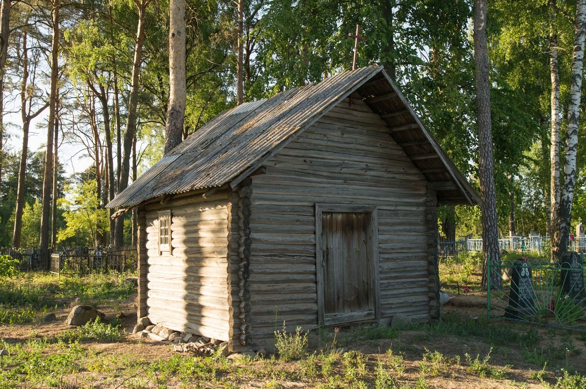 Капліца могілкавая. Калодкі